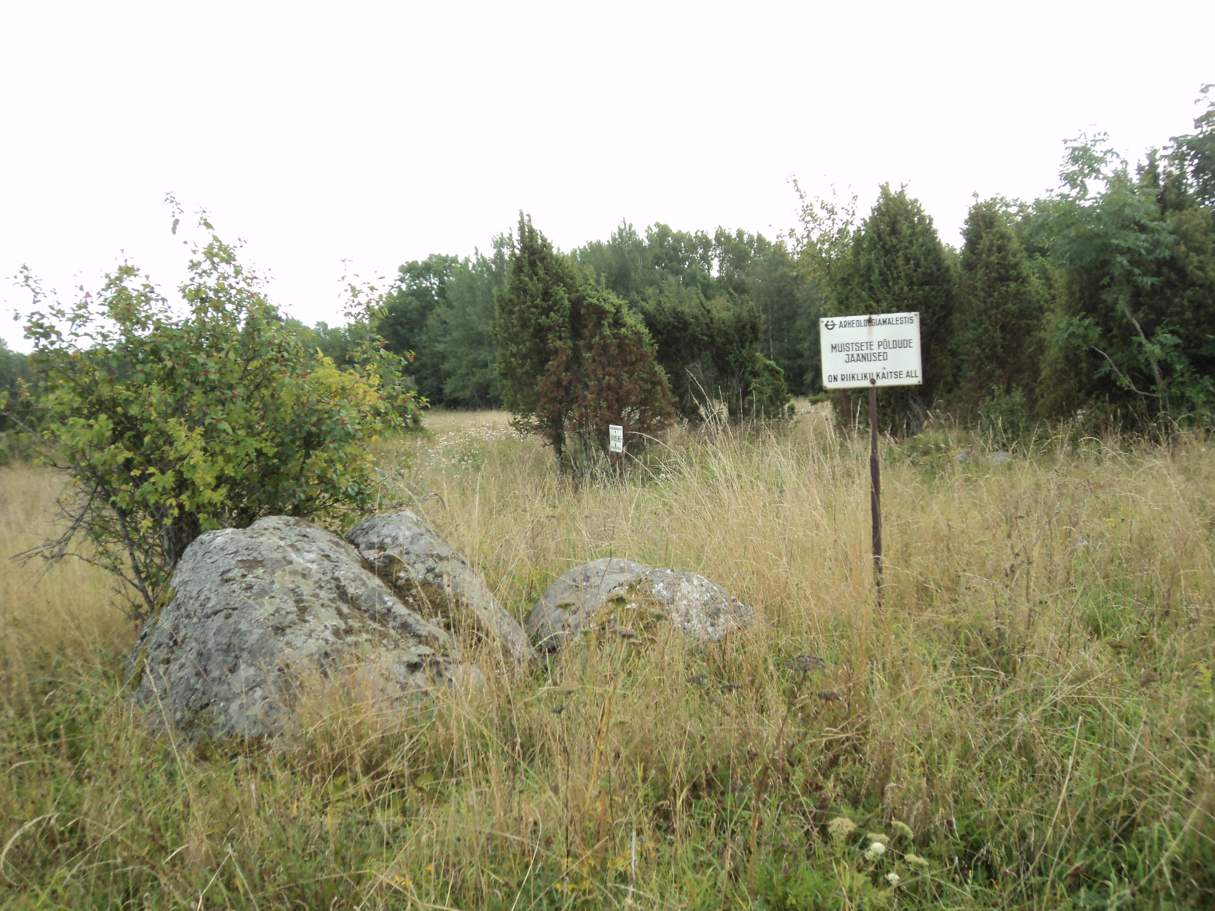 Kivikalme